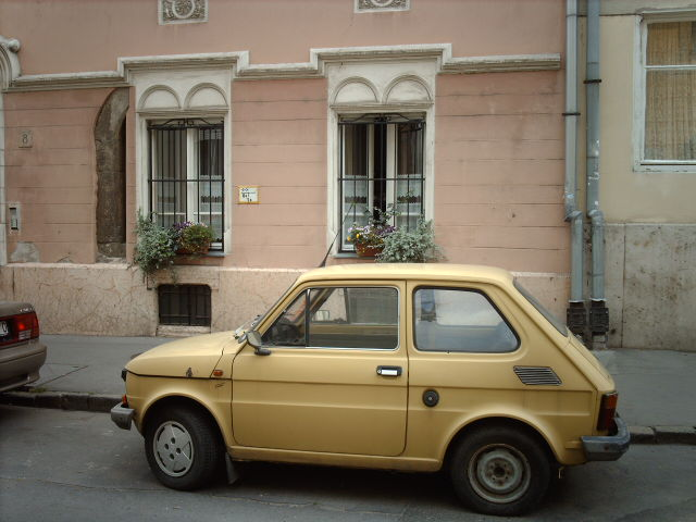 Polski Fiat 126p 650 (1978-1984)